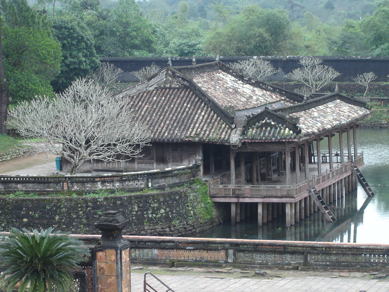 Xung Khiem Pavillion